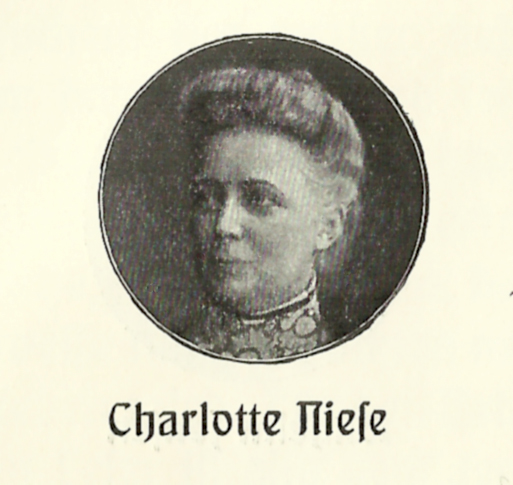 Porträt Charlotte Niese